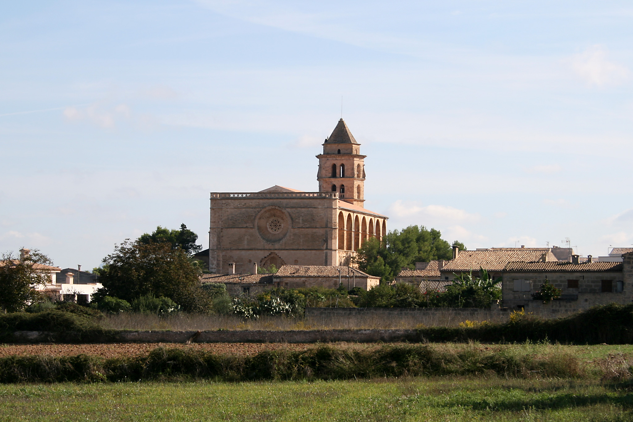 Petra, Mallorca, Spain